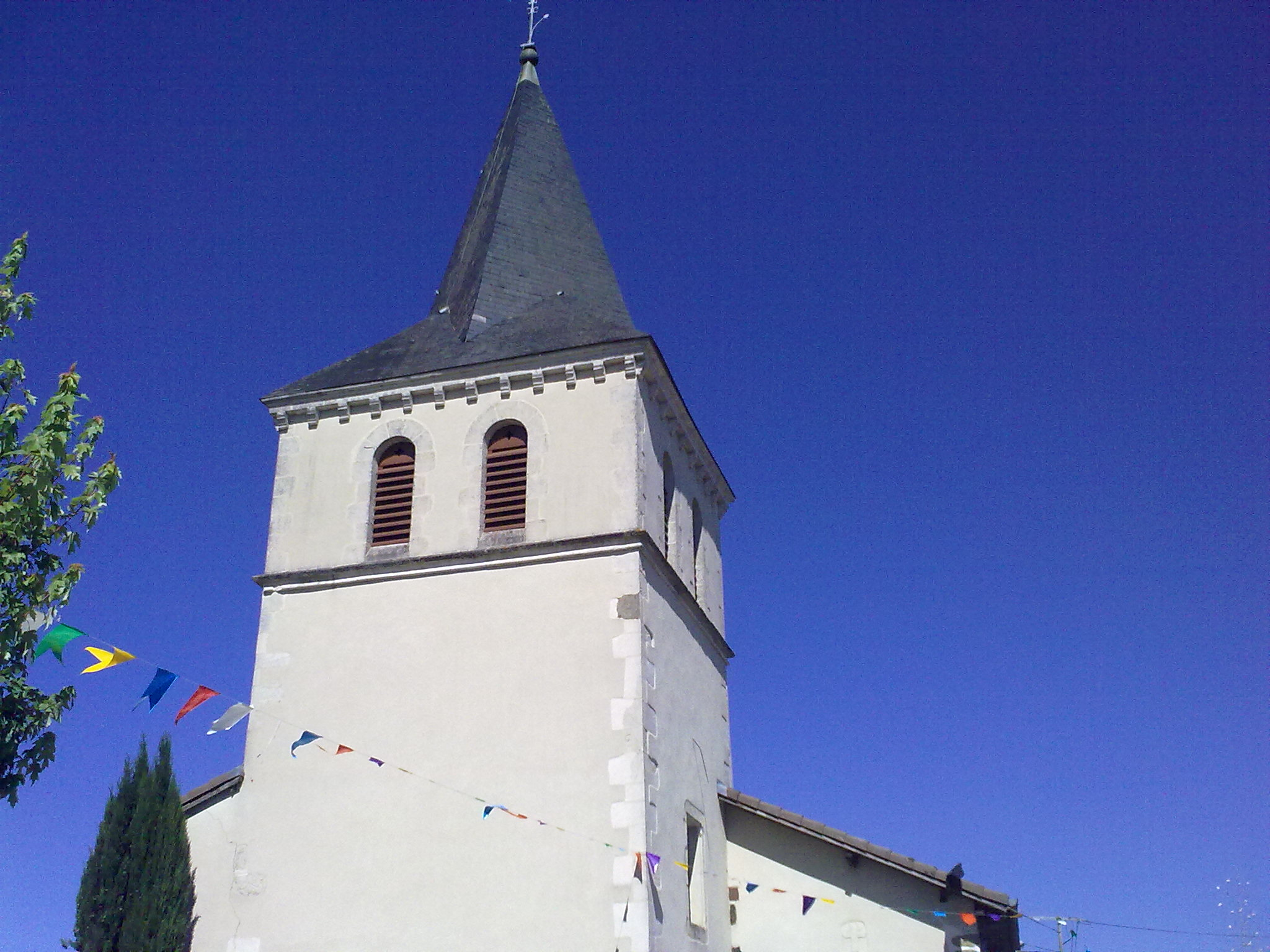 Cazalis (Landes) le 18 juillet 2010, France.